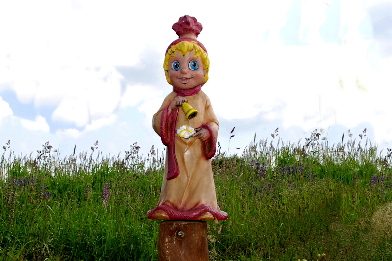 Boží Dar Ježíškova cesta, Ježíšek